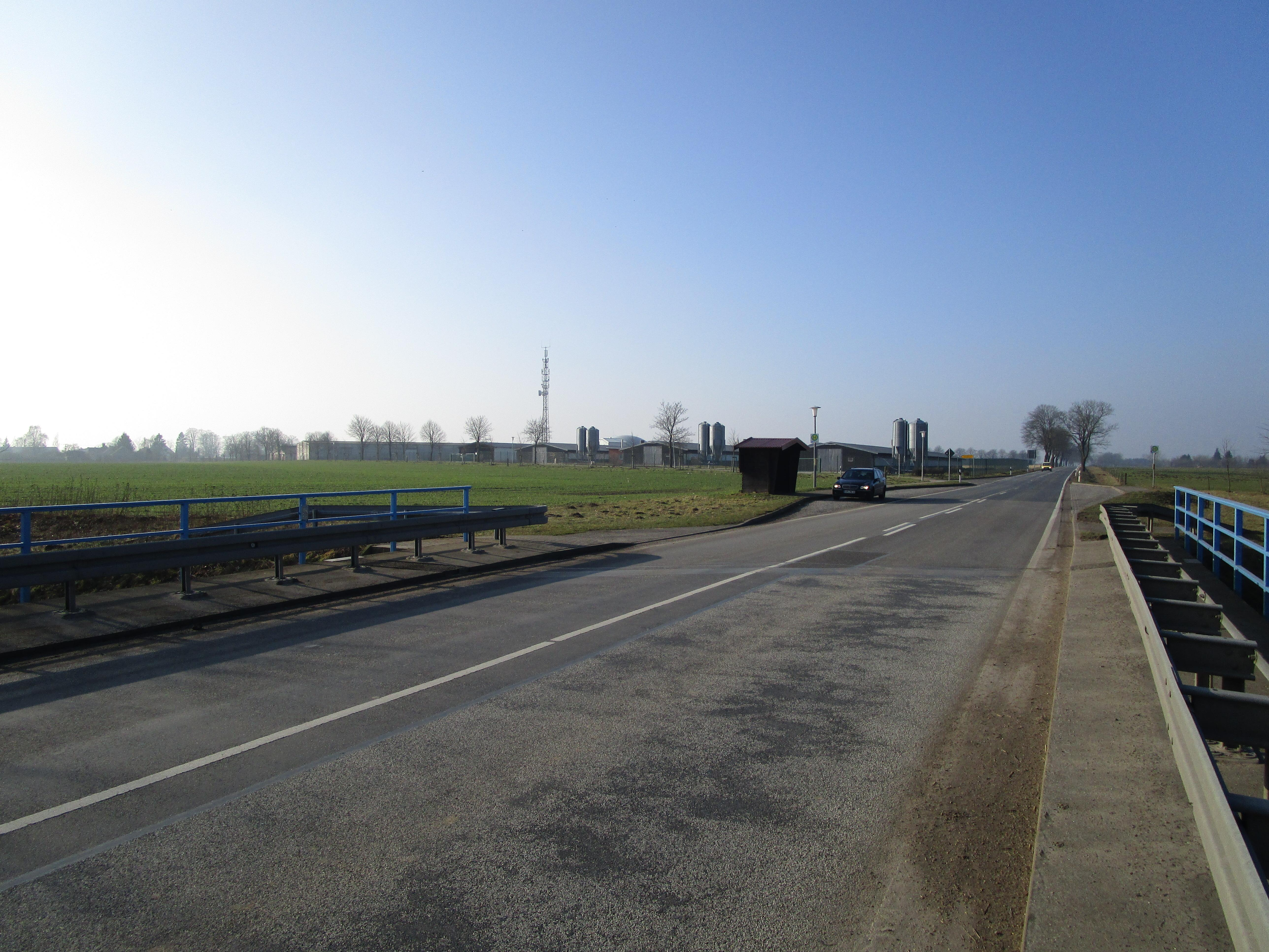 Dersewitz mit Geflügelanlage an der Bundesstraße 110, im Vordergrund Brücke über den Peene-Südkanal